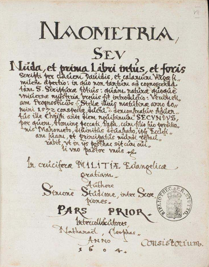 Simon Studion: Naometria …“ [Marbach am Neckar] 1604, Titelseite.